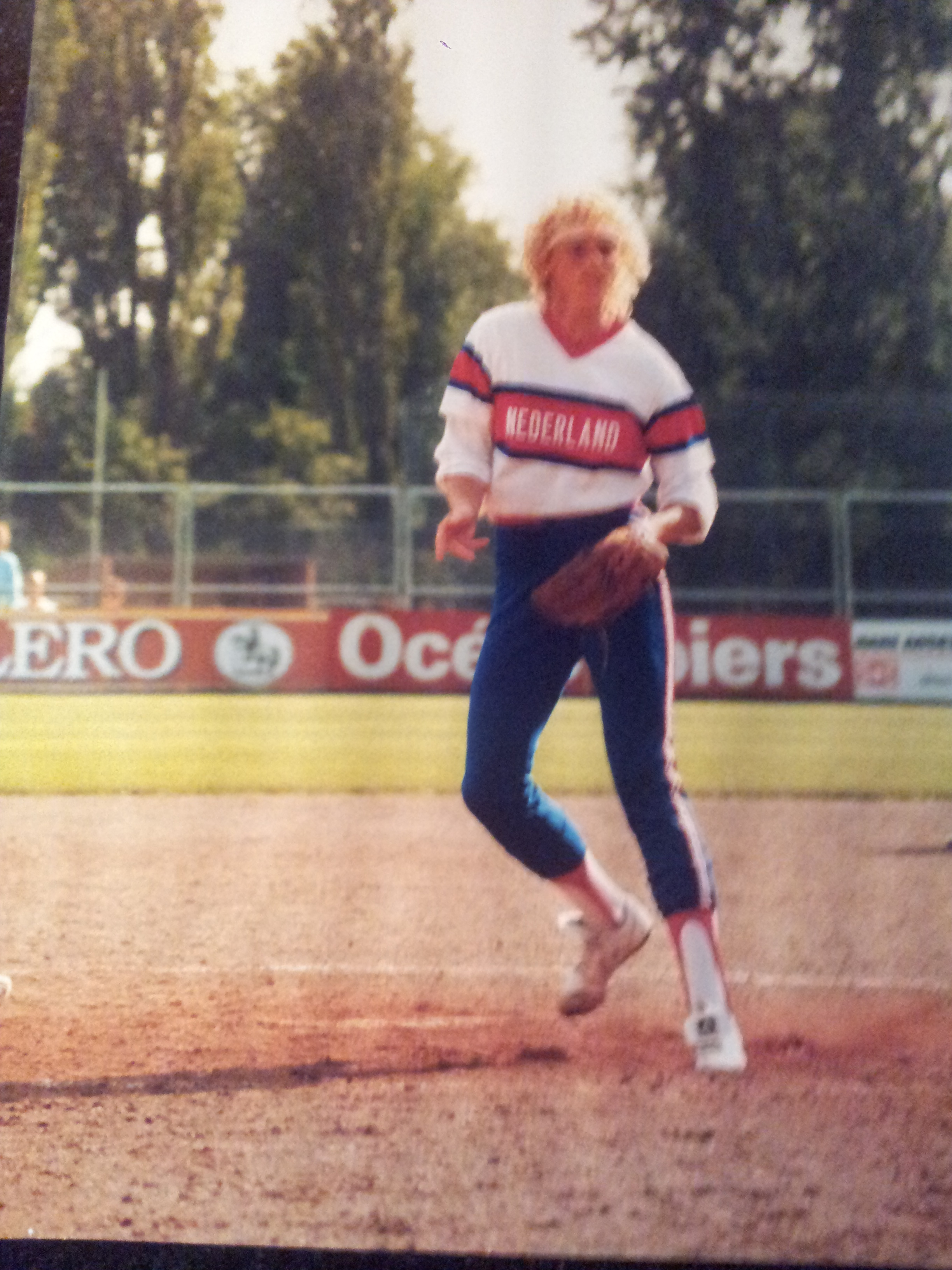 Karin Brookhuis in actie als pitcher in Nederlands team ('88).